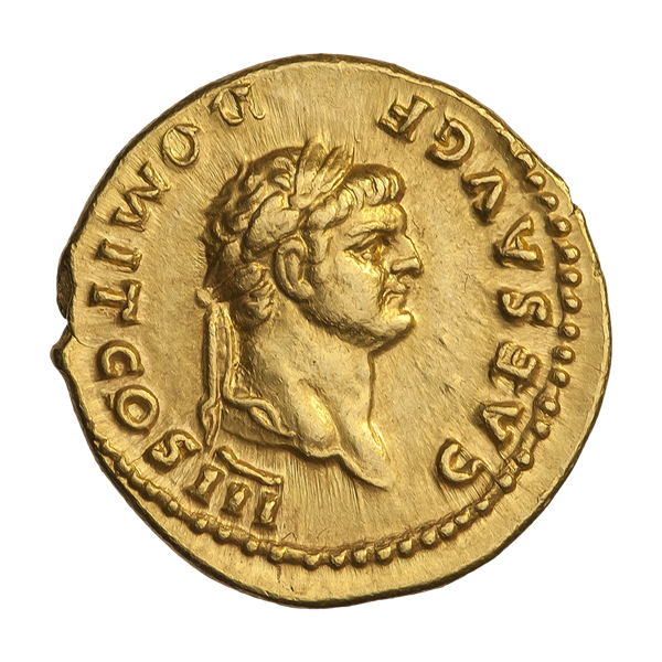 Ауреус. Домициан, цезарь. Ок. 74 г. (аверс). Надпись CAES AVG F DOMIT COS III. Портрет Домициана в лавровом венке, вправо.